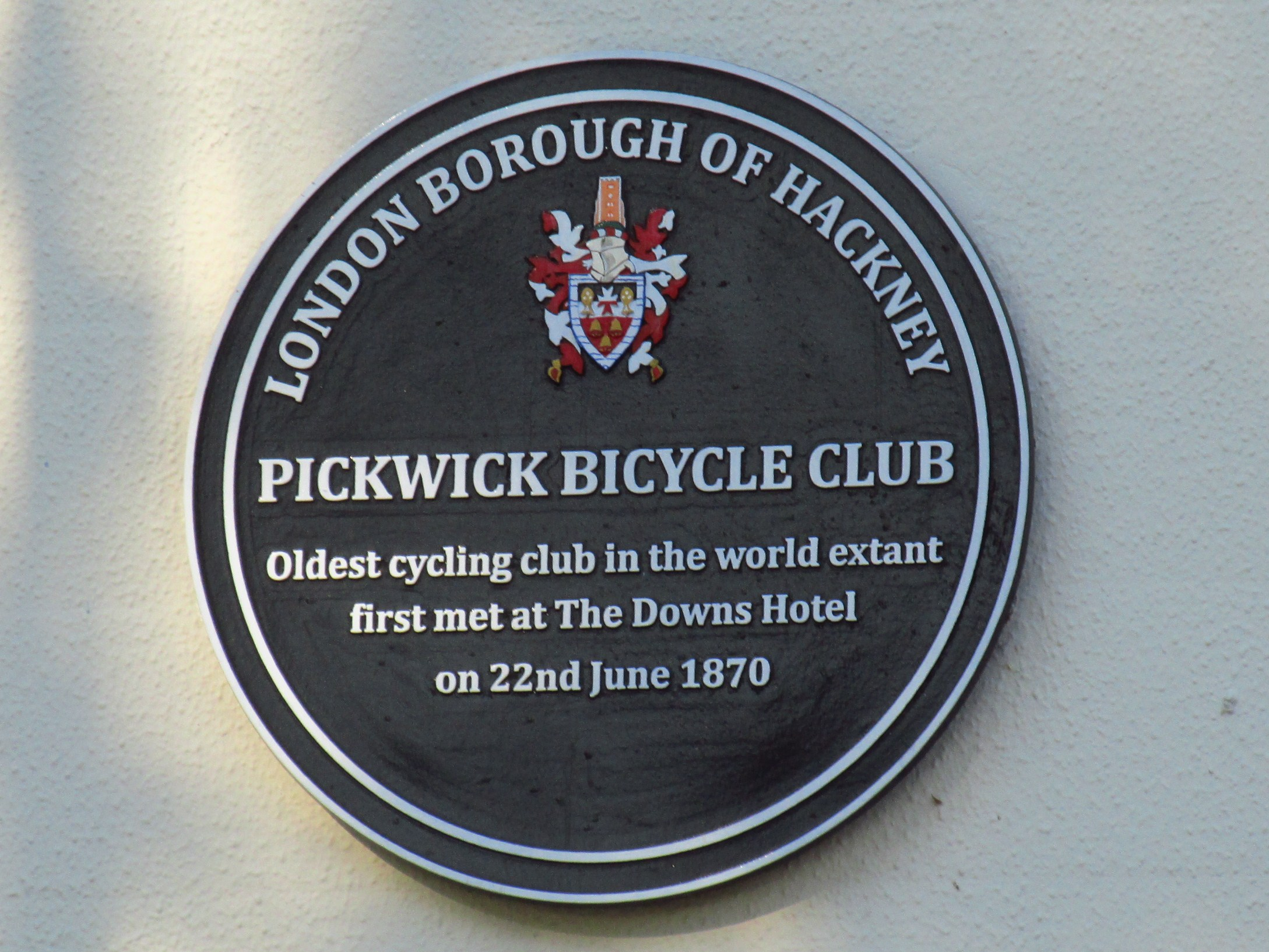 Tafel zur Erinnerung an die Gründung des "Pickwick Bicycle Clubs" am Downs Hotel in Hackney, Londeon